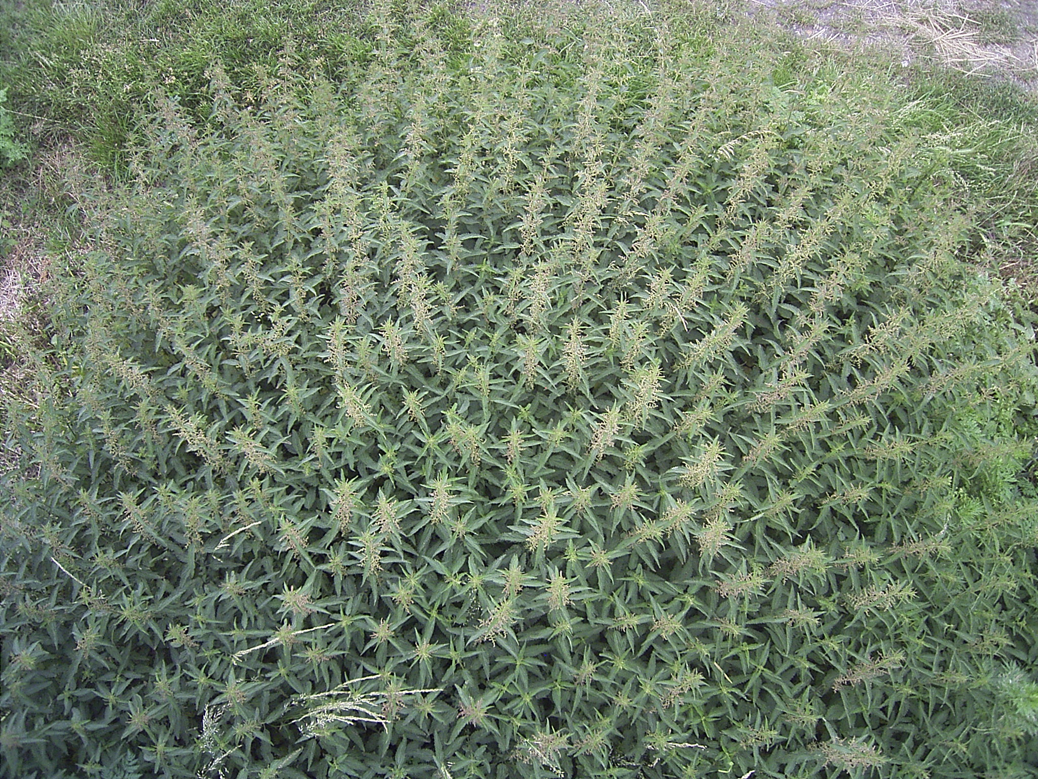 Urtica dioica, large stand, Hansag, Austria